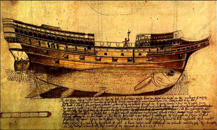 Иллюстрация из O Livro da Fábrica das Naus